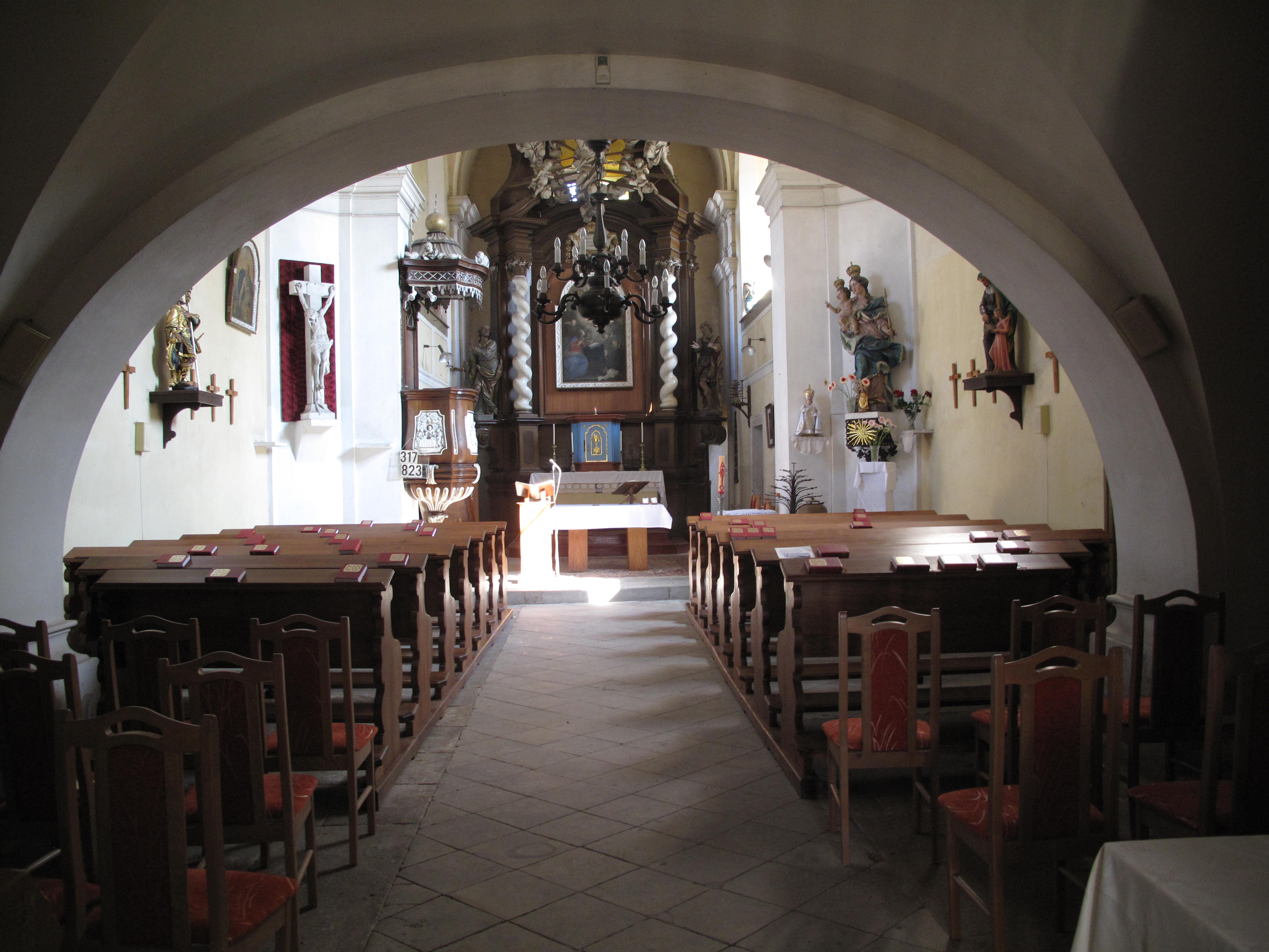 Úvaly, interiér kostela